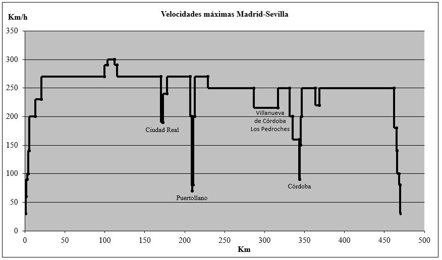 Cuadro de velocidades máximas de la línea